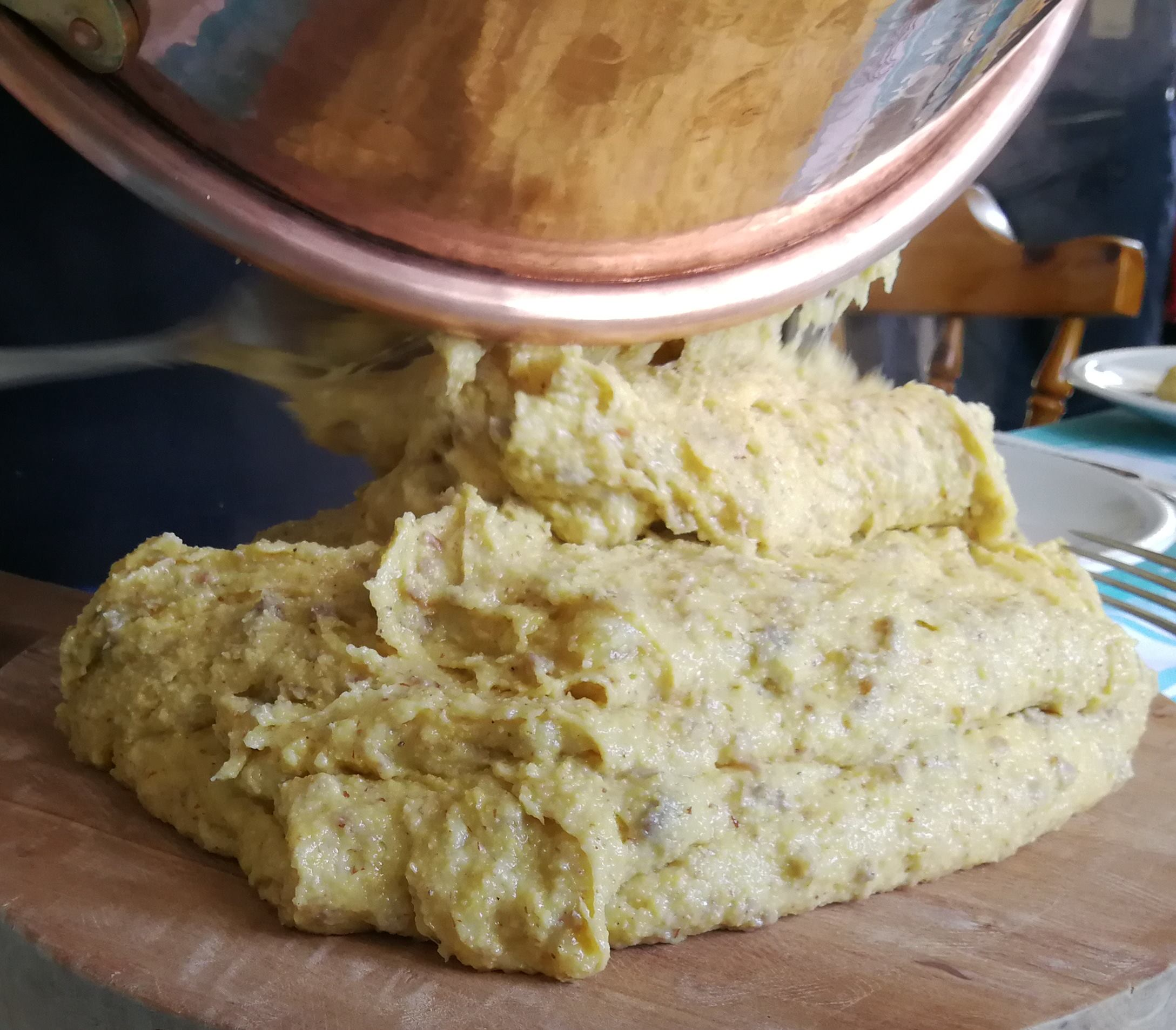 Polenta carbonera - piatto tipico di Storo